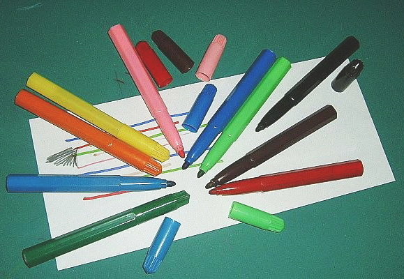 Dicke Filzstifte